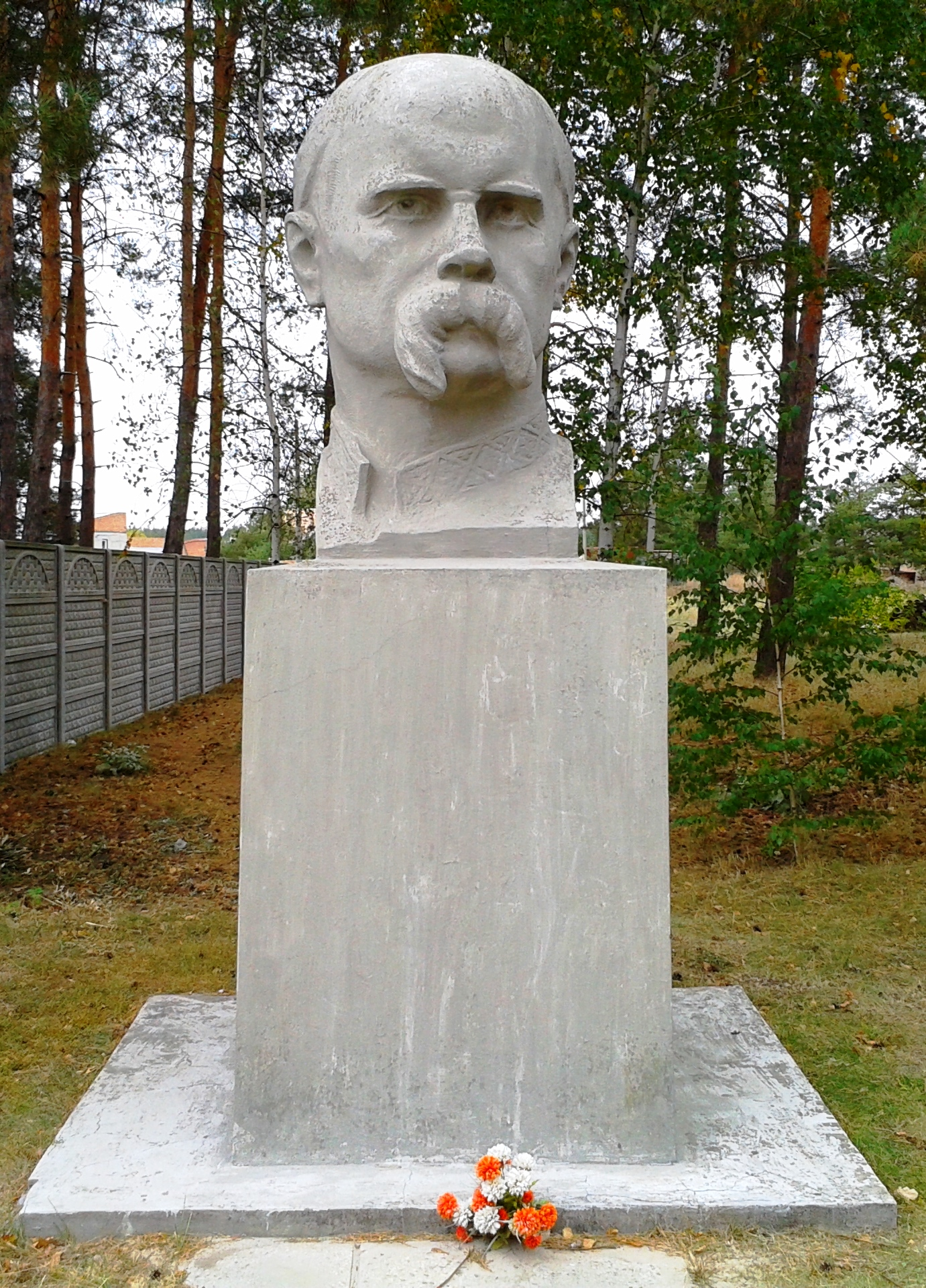 Фото пам'ятника Т.Г. Шевченку в Полтавському р-ні, с. Микільське.